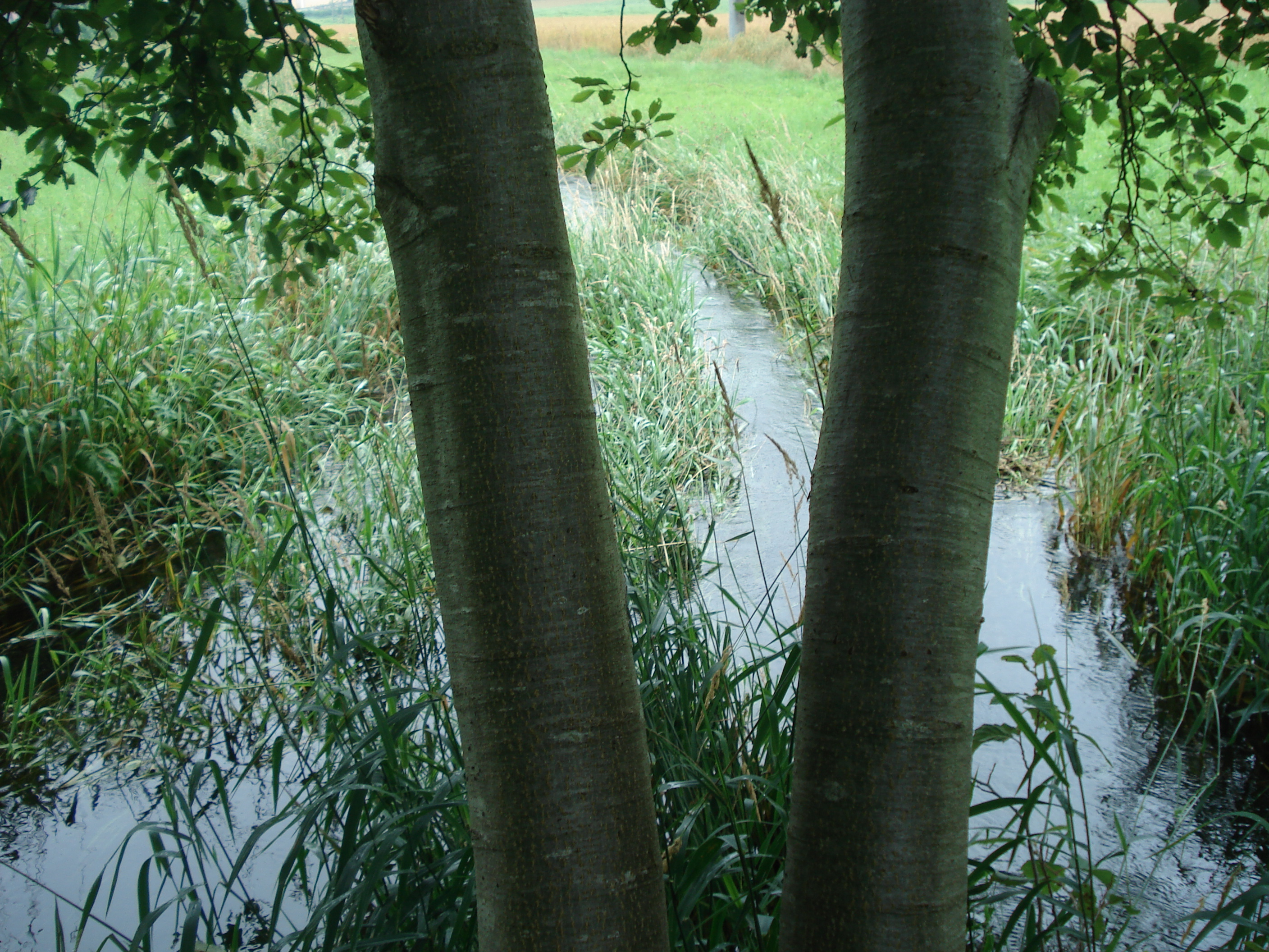 Die Erpf (links) mündet in die Lauchert (rechts)